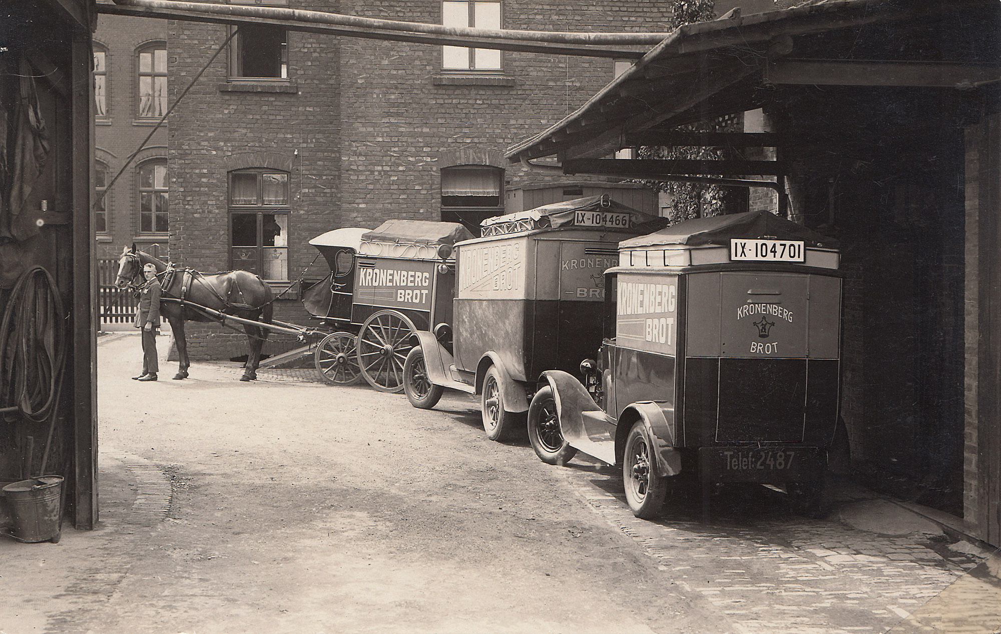 Fuhrpark der Bäckerei Kronenberg, Potthofstraße in Schwelm. Blick über den Hinterhof der Bäckerei (links im Hintergrund die Schule Potthofstraße). Das Pferd hält Johannes Kronenberg, der jüngste Sohn der Bäckersfamilie